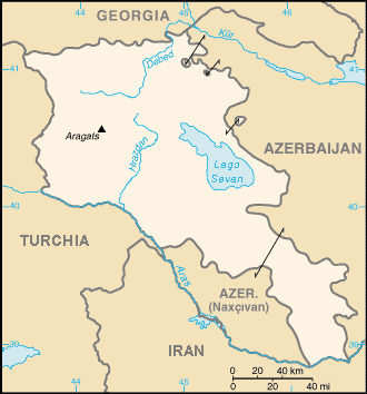 Armenia locator map